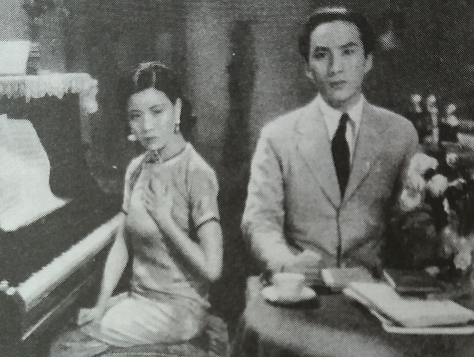 新女性剧照